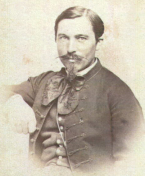 Wein János mérnök. Kb. 1870.